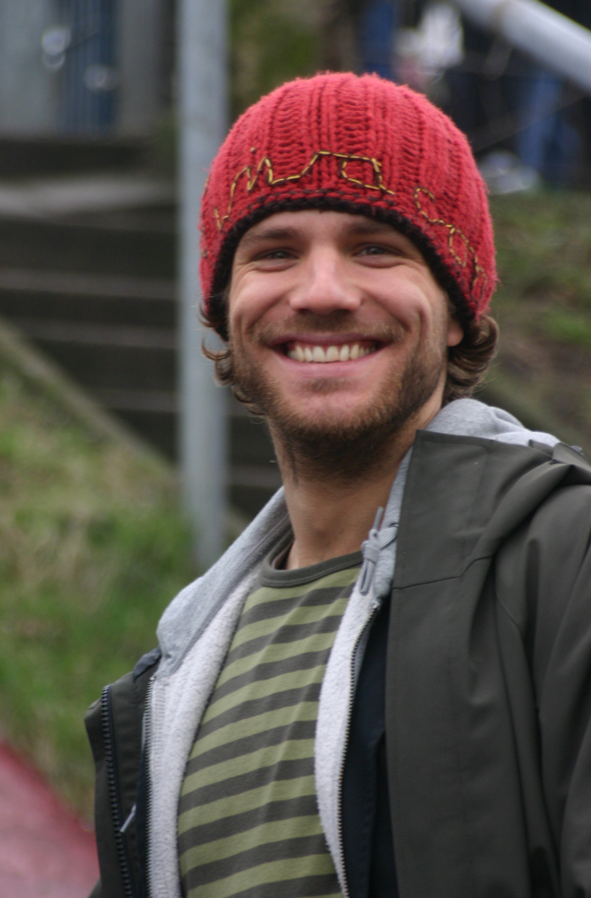 Fußballspieler Benjamin Adrion im Millerntor Stadion des FC St. Pauli in Hamburg